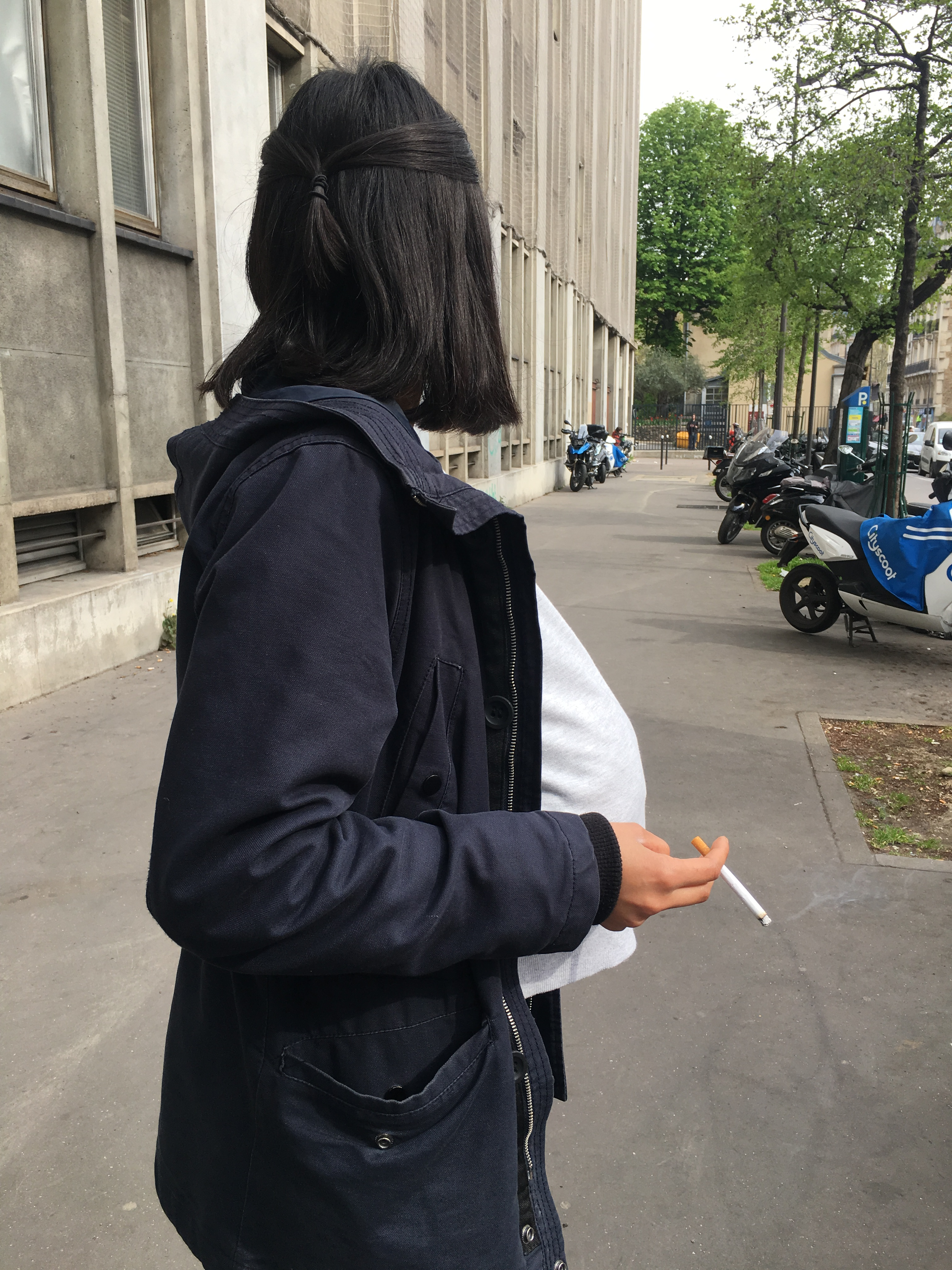 Jeune femme brune enceinte, fumant dans la rue à Paris.